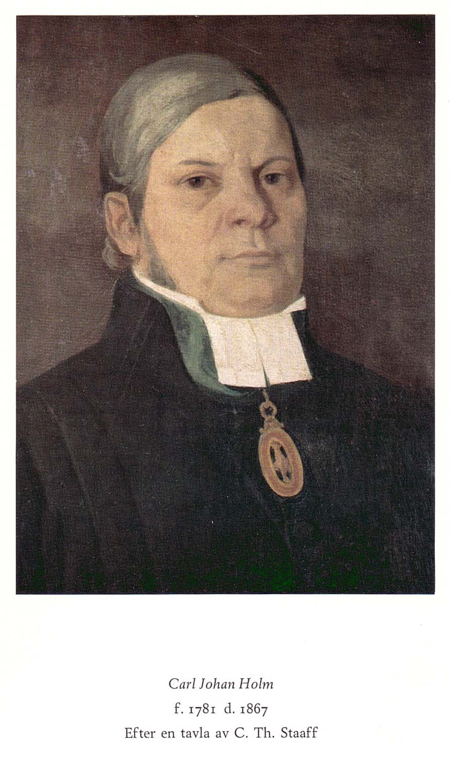 Porträtt av prosten Carl Johan Holm, verksam i Själevad församling åren 1824-67, född i Helsingfors 1781. Porträttet målat av Carl Theodor Staaff (1816-1880).